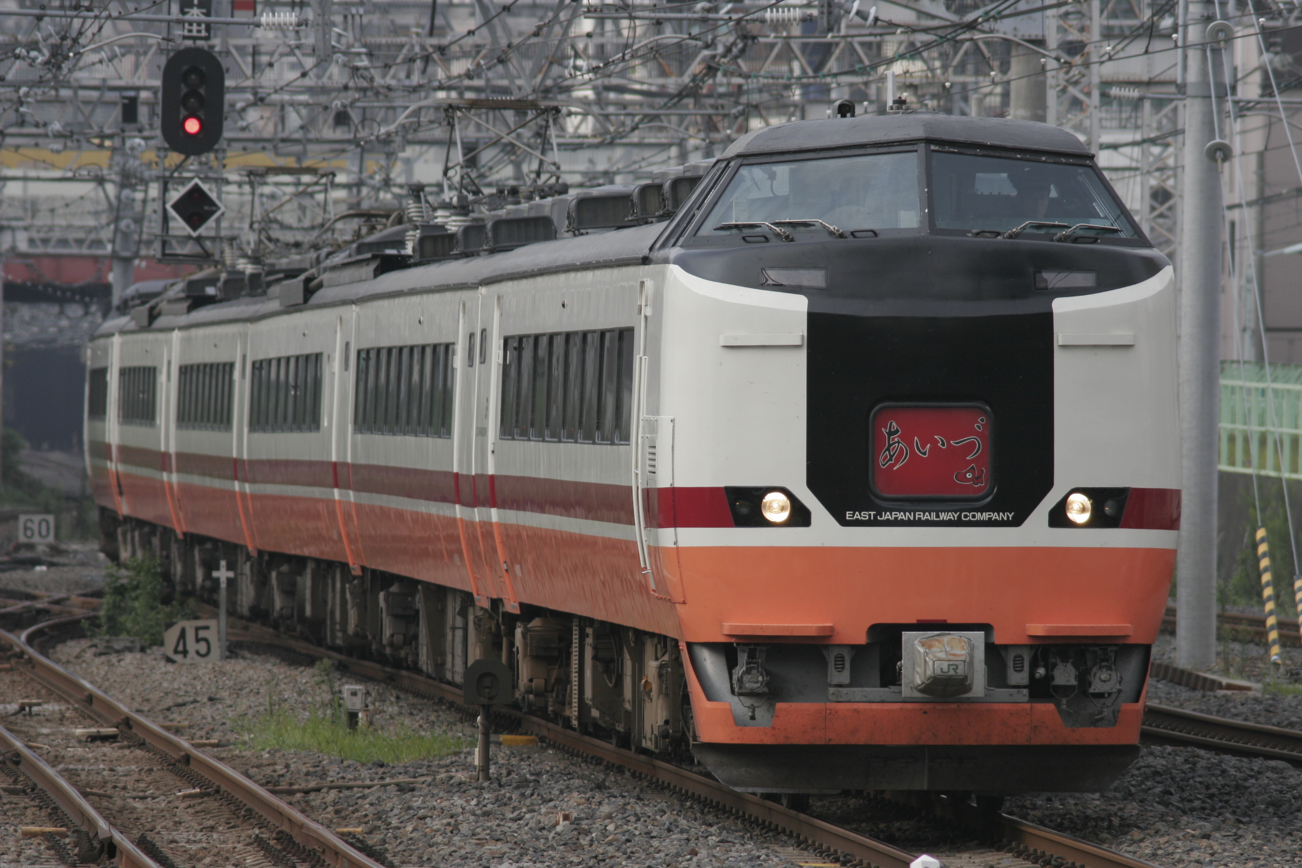 2005年の特急あいづに使用された485系改造車